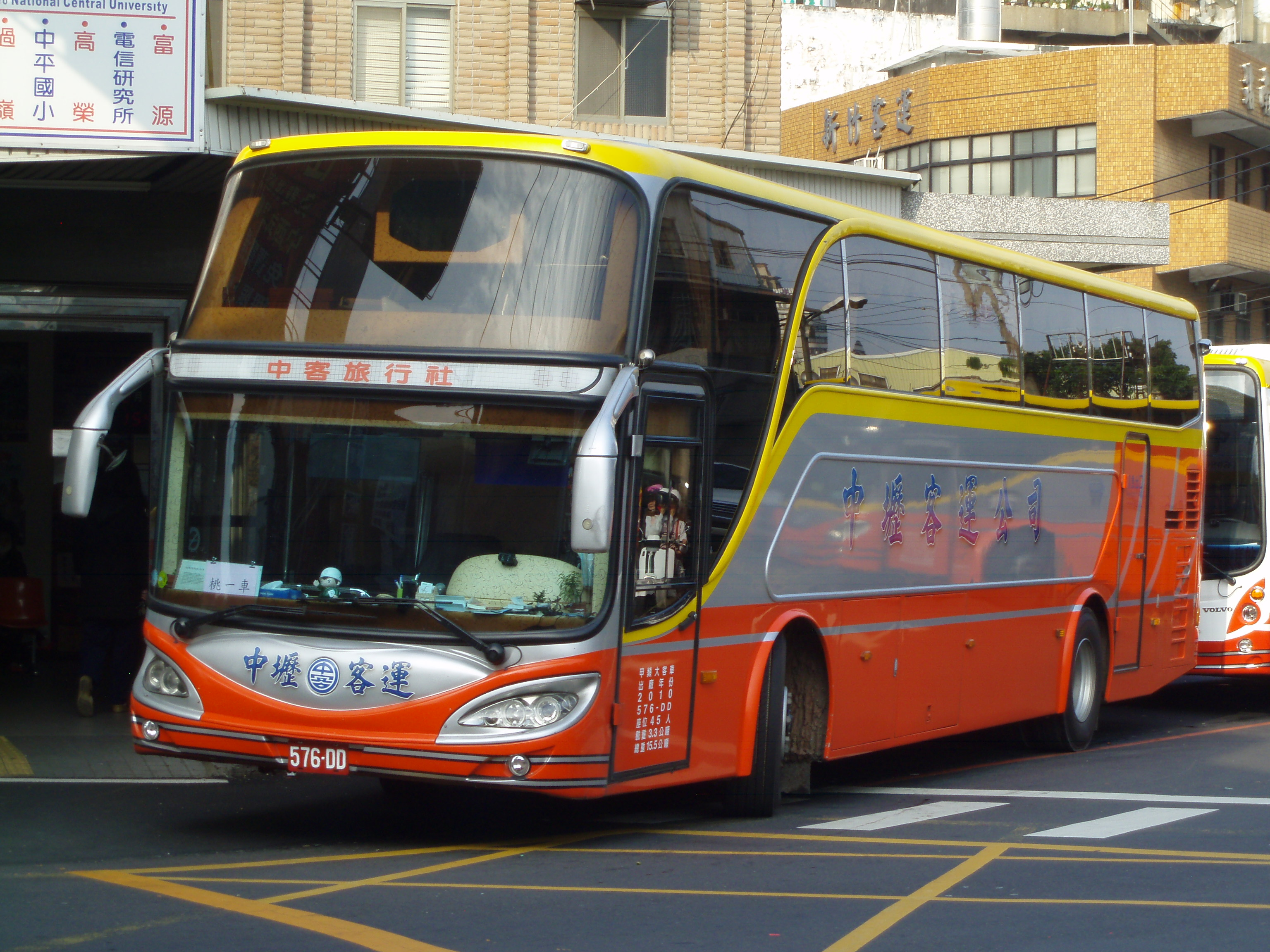 中壢客運2010年三菱扶桑RM11GNL3遊覽車576-DD。